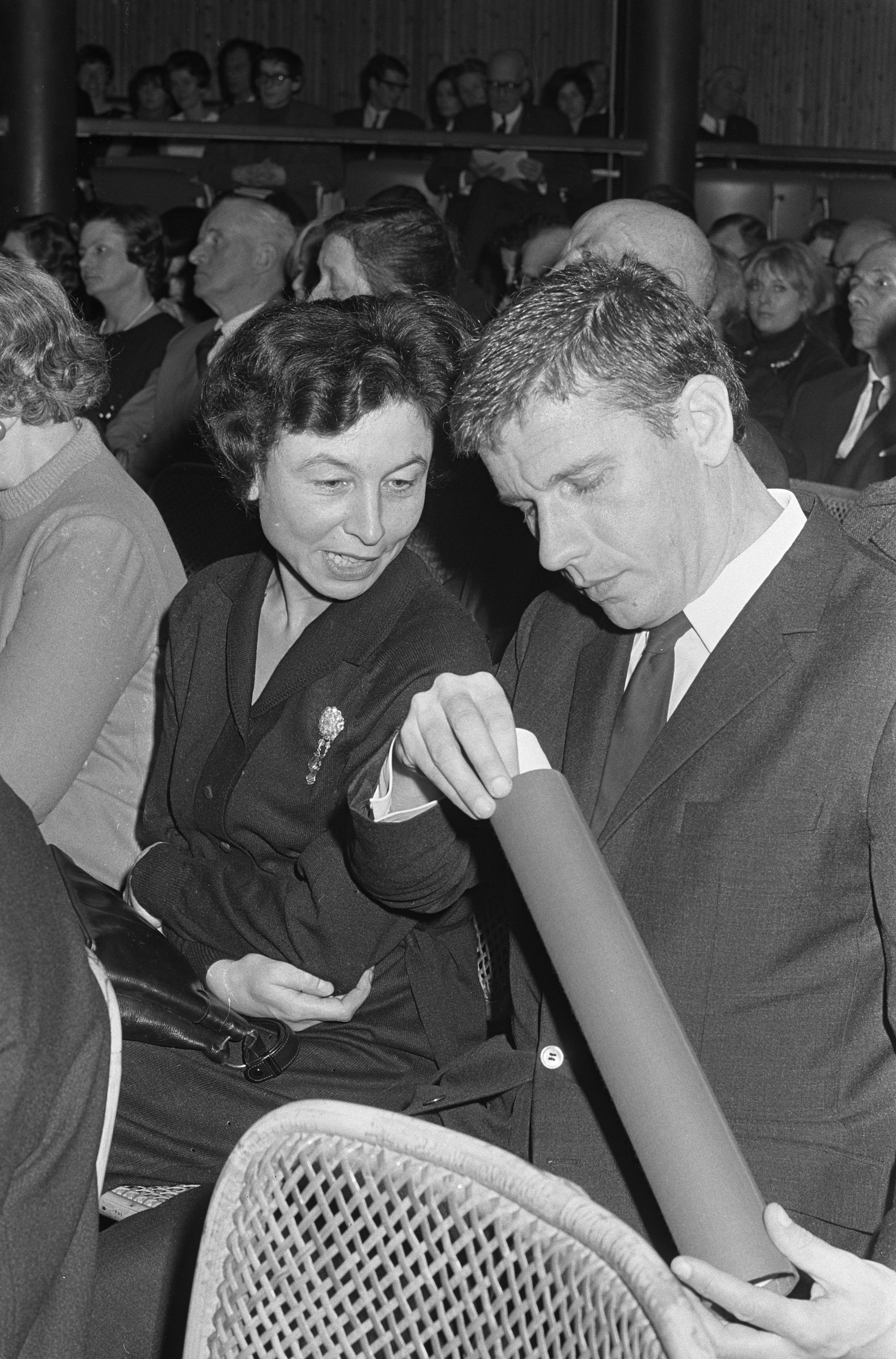 In Stedelijk Museum Amsterdam (Nederland) aan Gerard van het Reve de kunstprijs voor de stad Amsterdam uitgereikt. Datum 2 december 1966